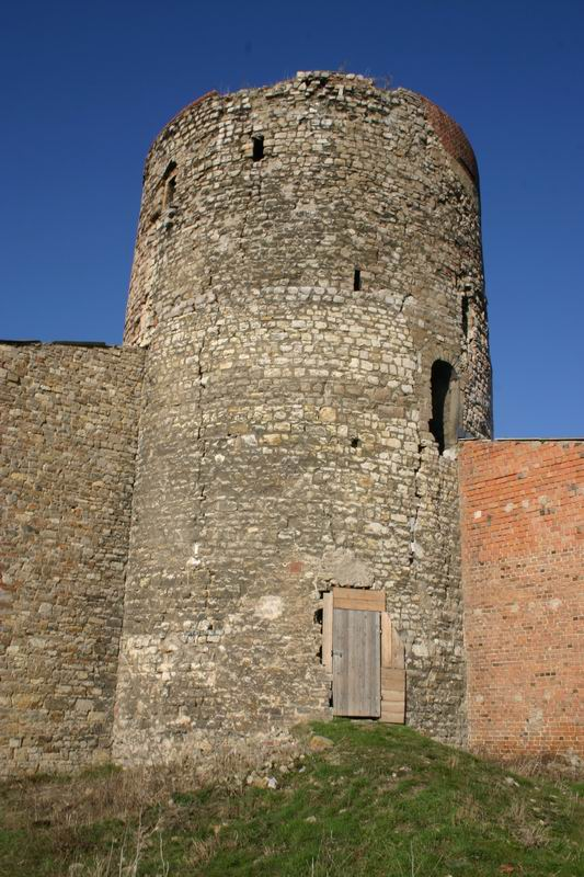 Freckleben, eigenes Foto, public domain, Rundturm 1. H. 12. Jh., Mewes 22:06, 7. Apr 2005 (CEST)